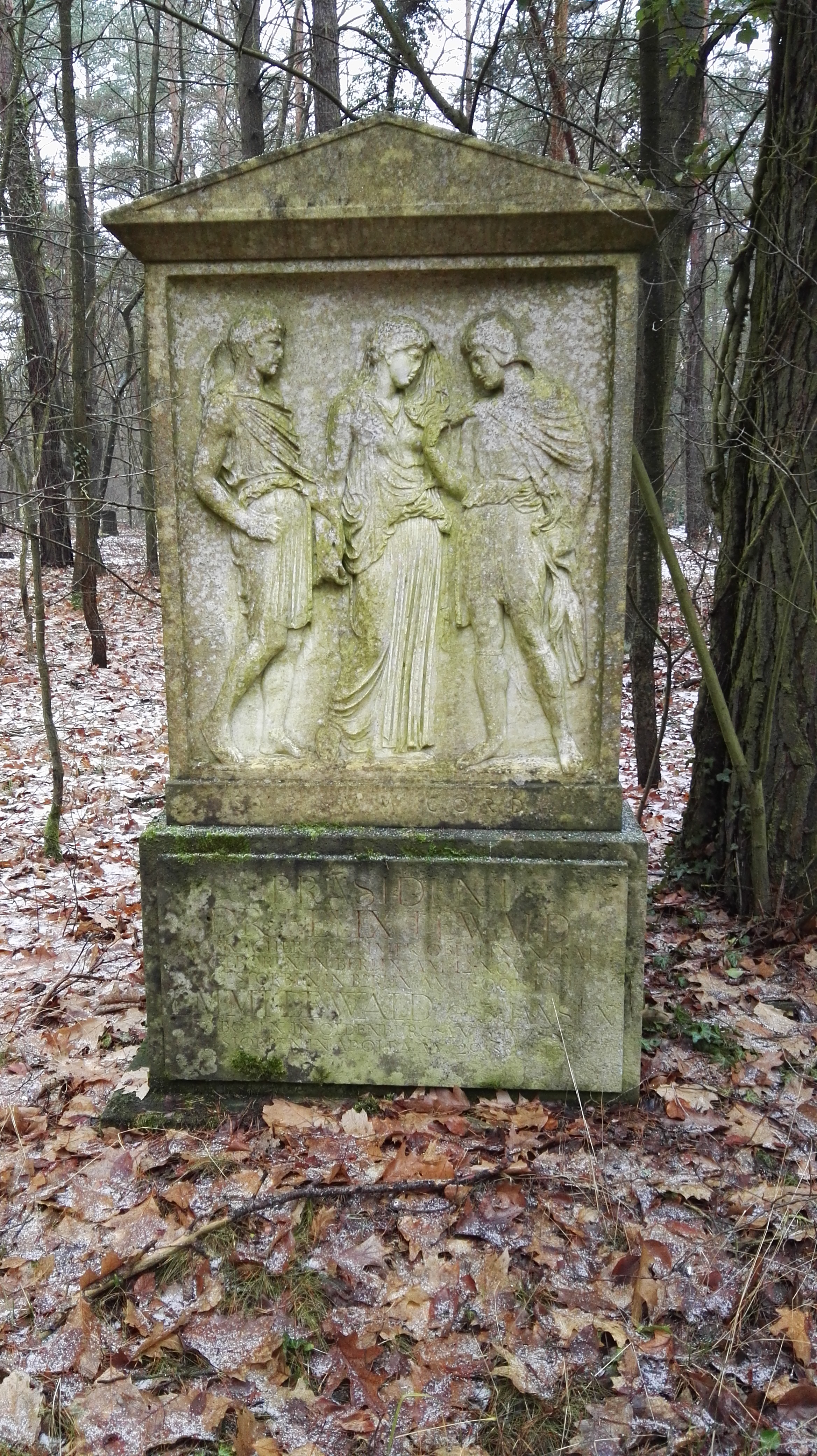 Grab von Felix Lewald auf dem Südwestkirchhof Stahnsdorf